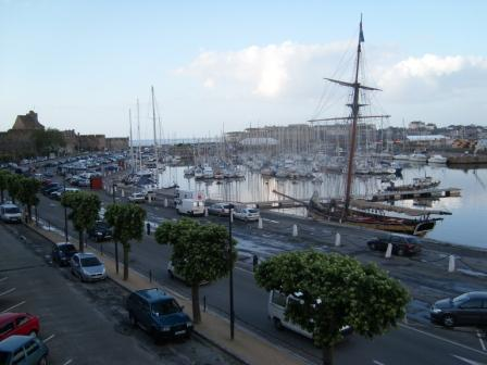 Saint Malo Harbour